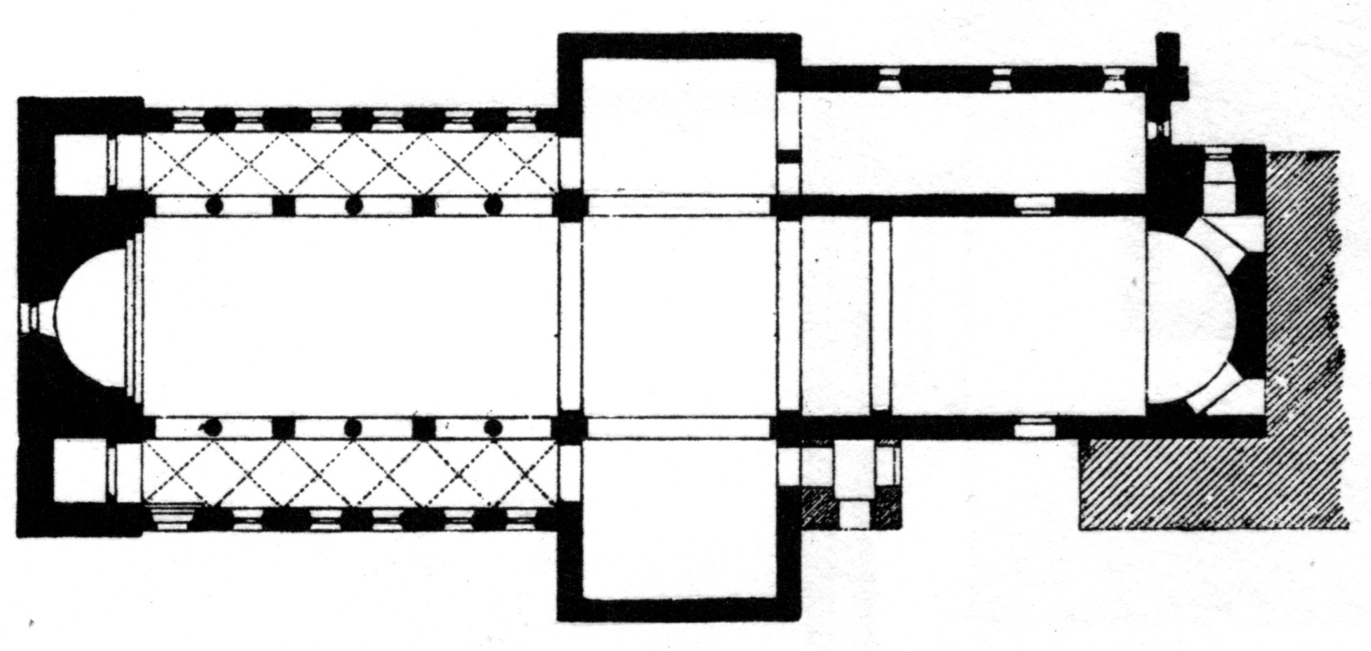 Huys(e)burg. Klosterkirche, Floor plan.